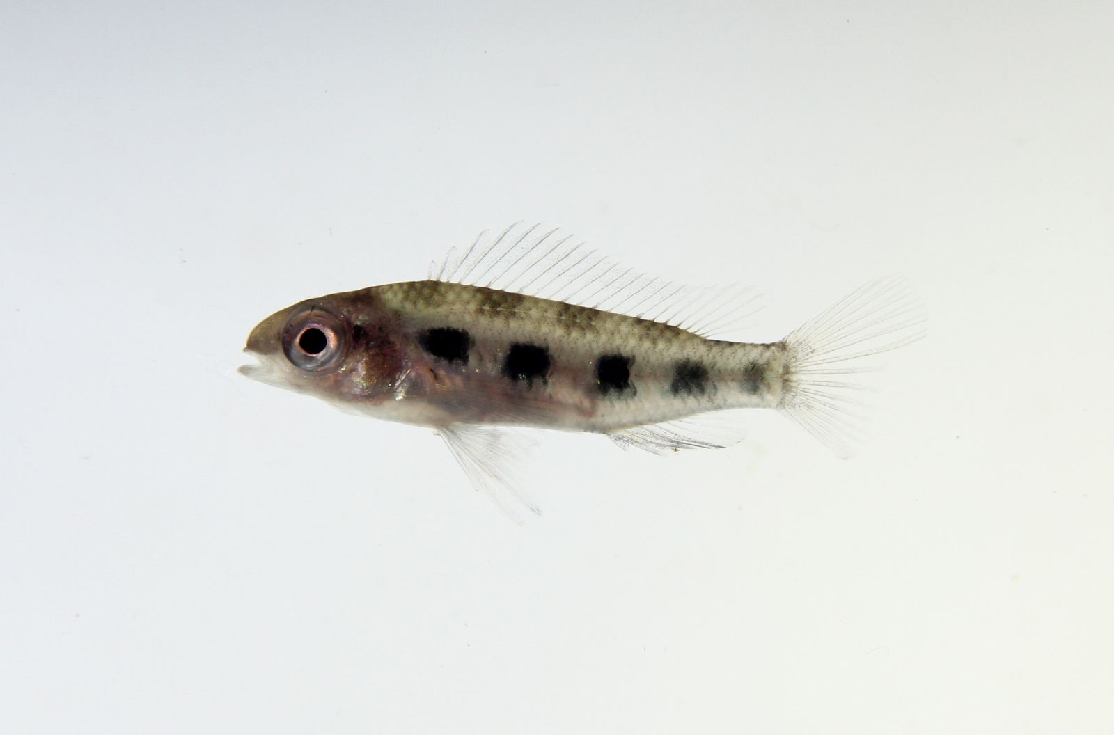 Dicrossus filamentosus, juvenile specimen.